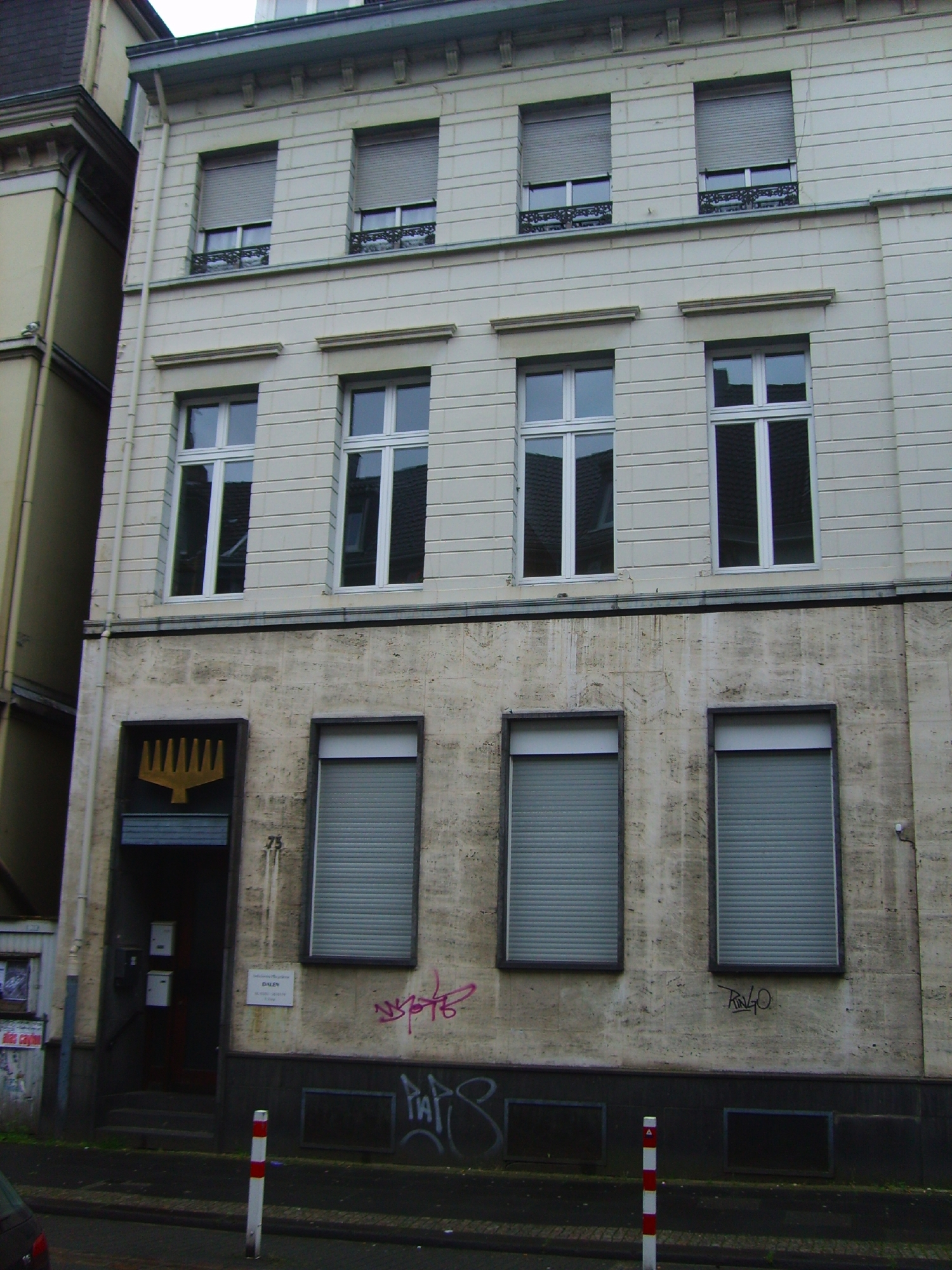 Haus der jüdischen Kultusgemeinde, Wuppertal-Elberfeld